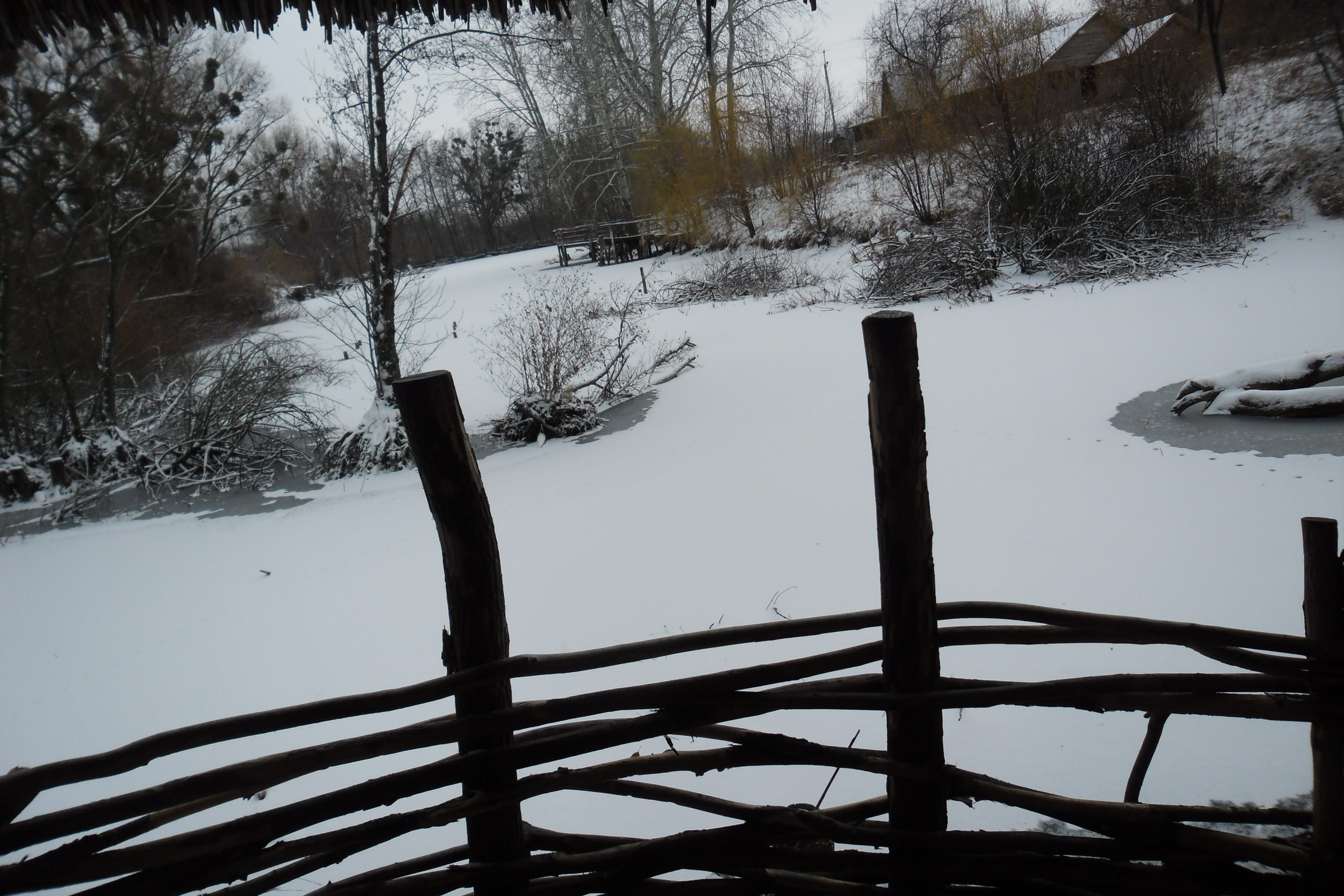 Сільський тин